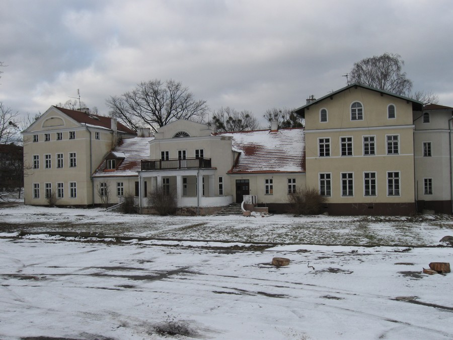 Dwór w Gdyni Kolibkach